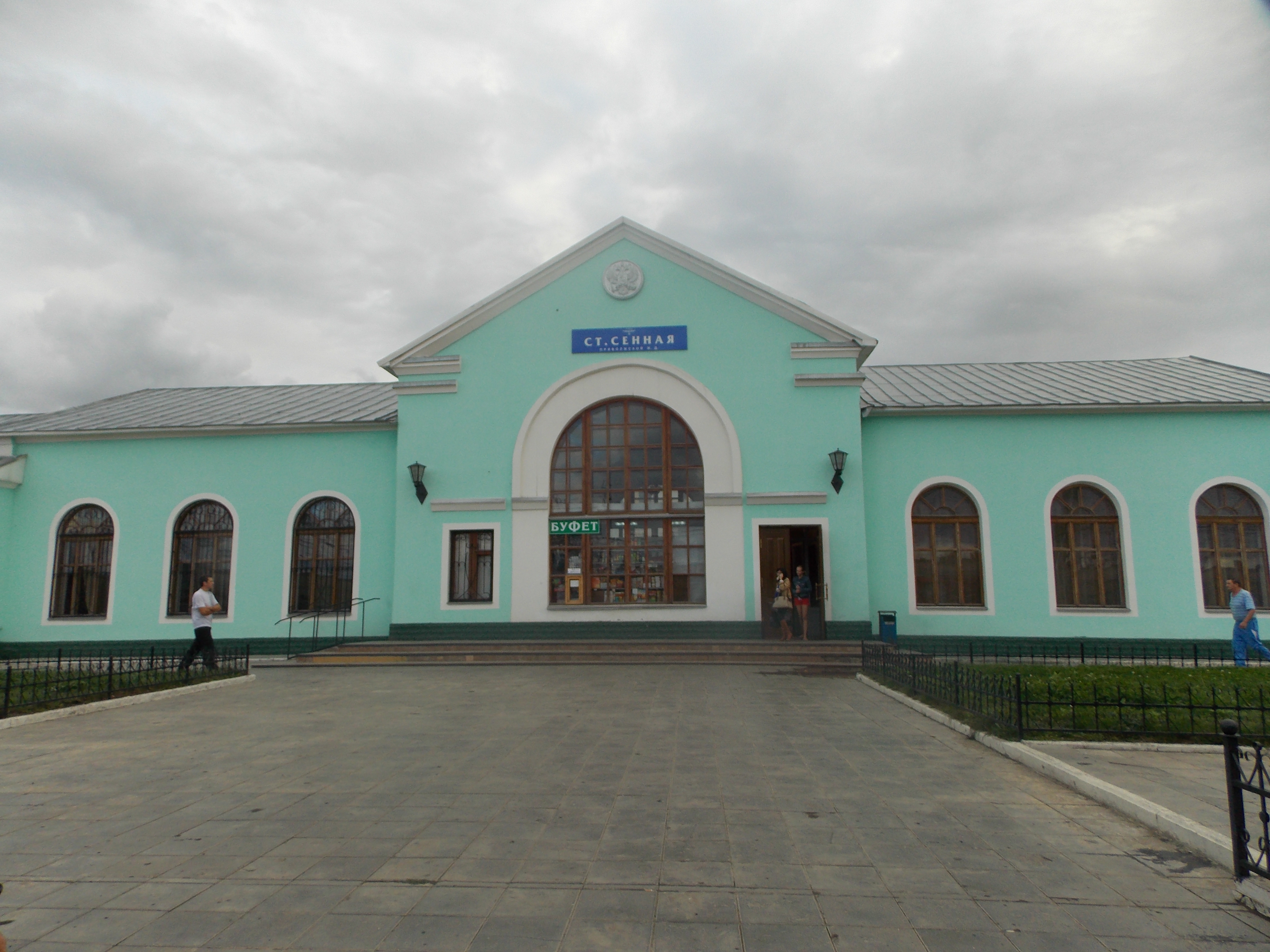 Станция Сенная, Приволжская железная дорога